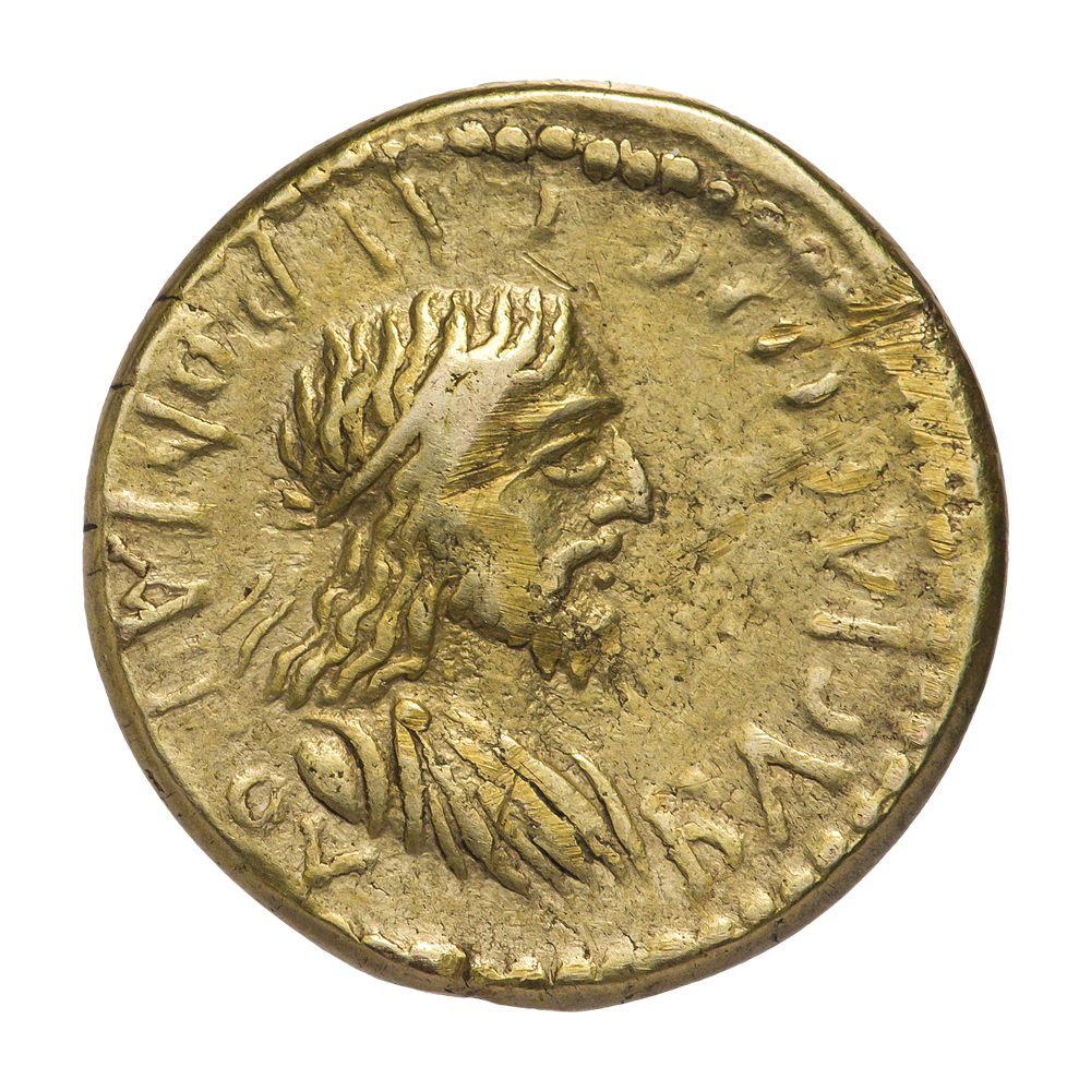 Боспорское царство. Савромат II (174—211). Статер. Ок. 209 г. Аверс. Надпись ВАСIΛEωC CAVPOMATOY. Бюст царя Савромата II, вправо. Точечный ободок.